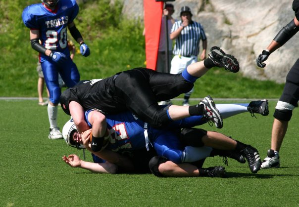 Galdiators VS. Trolls - 2008